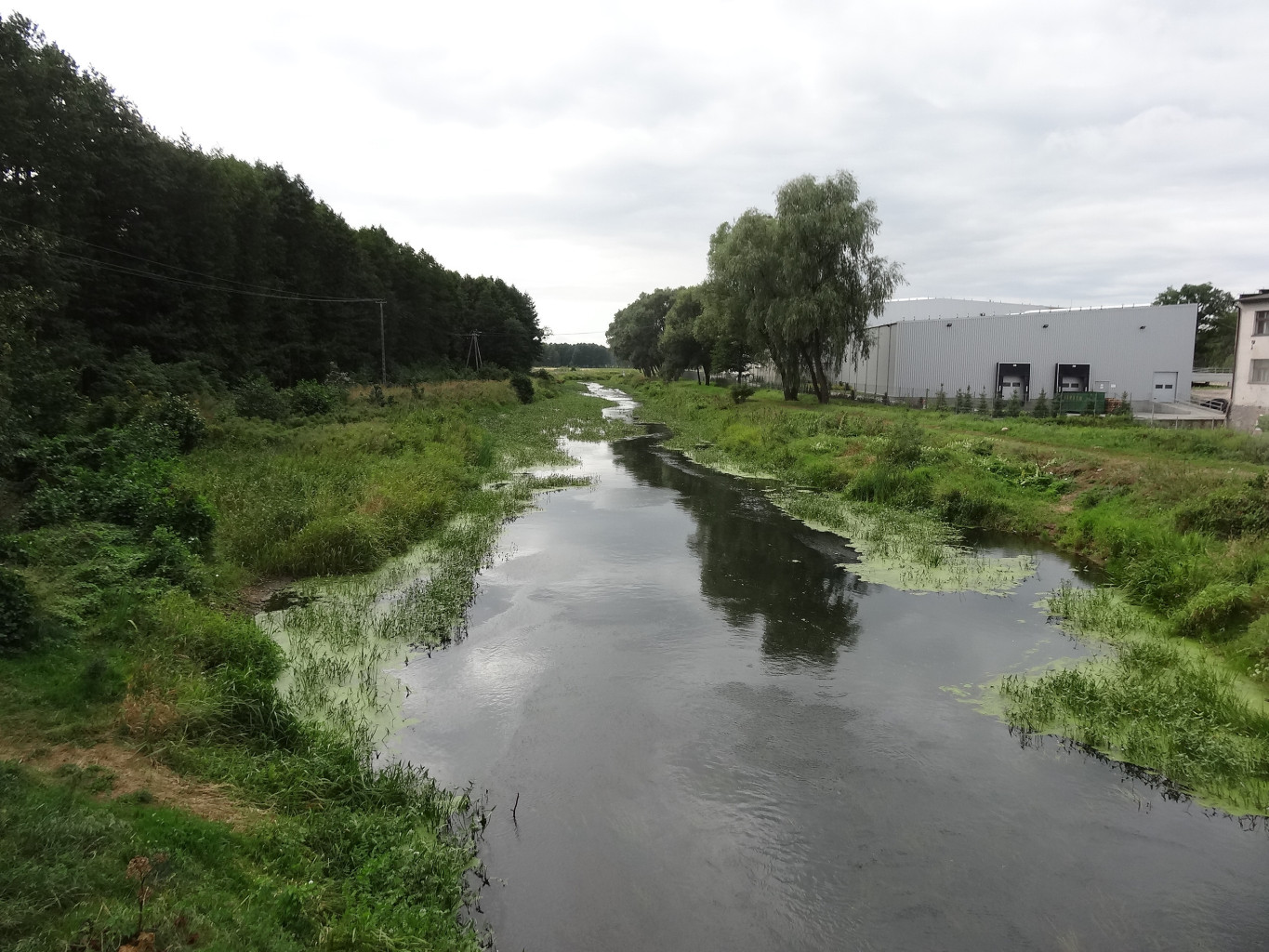 Rzeka Noteć w Turze, gmina Szubin, województwo kujawsko-pomorskie